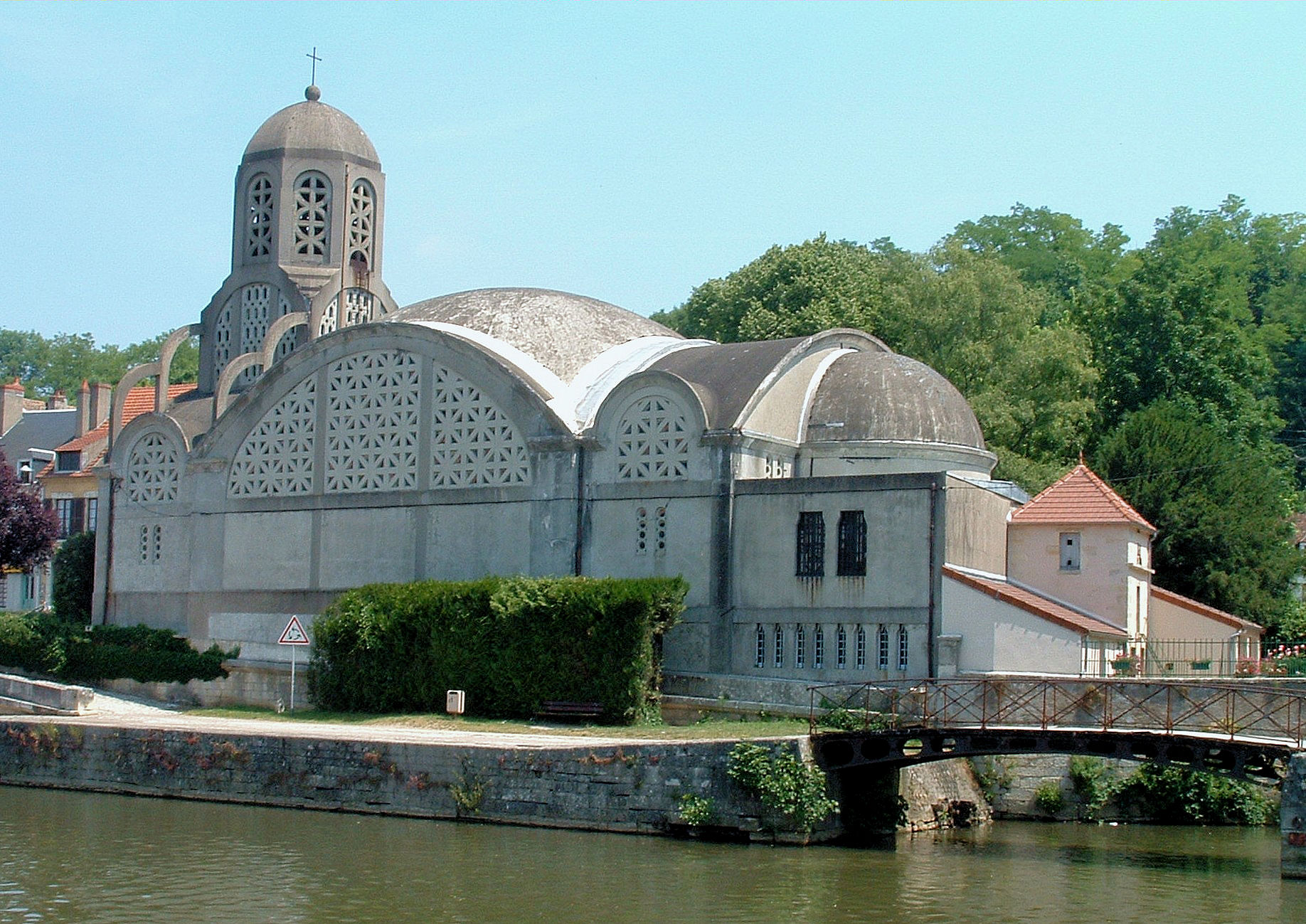 Clamecy - Eglise Notre-Dame-de-Bethleem